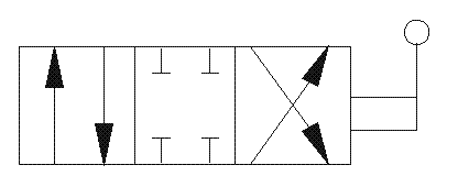 Условное графическое обозначение гидрораспределителя